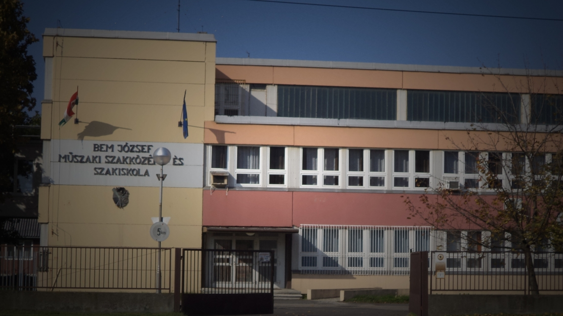 Bem József Műszaki Szakközép- és Szakiskola, Cegléd